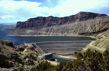 Boysen Dam, Wyoming